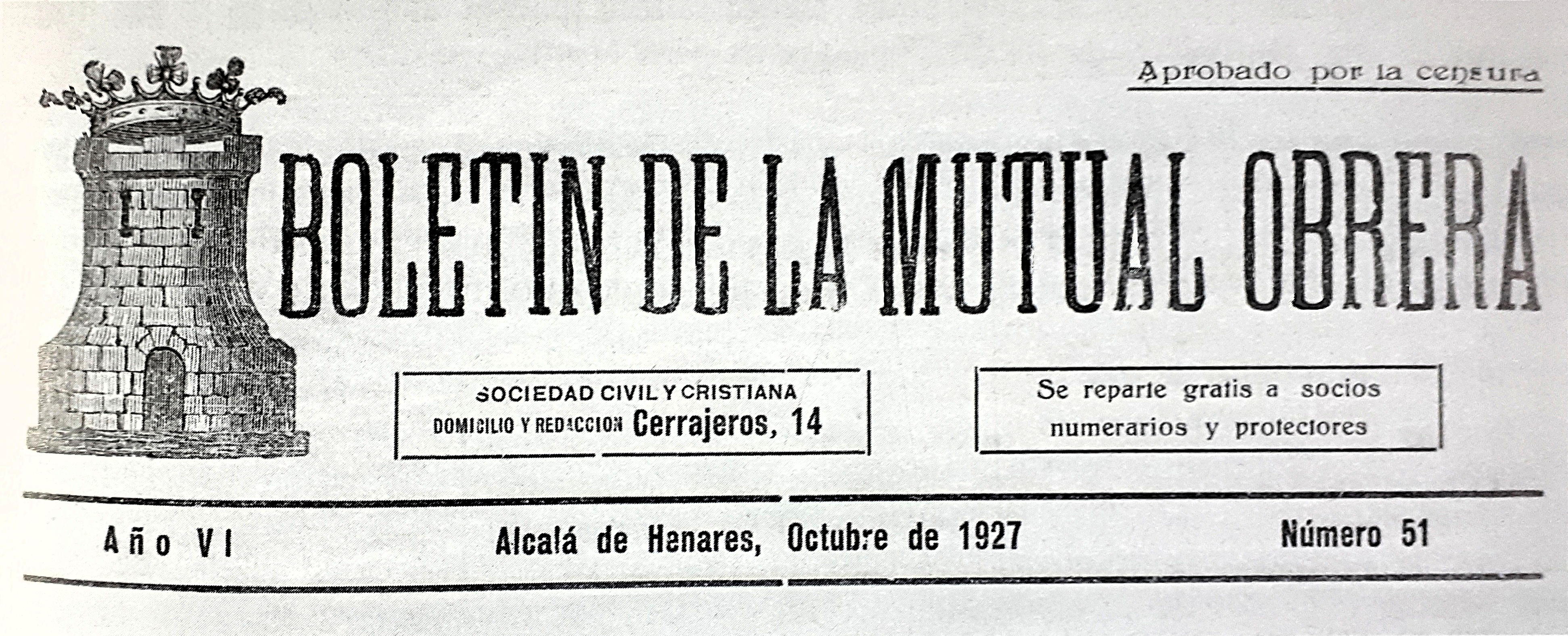 Cabecera del "Boletín de la Mutual Obrera" de octubre de 1927. A la izquierda del texto aparece una torre coronada que simboliza a la ciudad de Alcalá de Henares. Publicado en Alcalá de Henares (Comunidad de Madrid - España) entre diciembre de 1922 y abril de 1933, en los Talleres tipográficos "La Cuna de Cervantes".